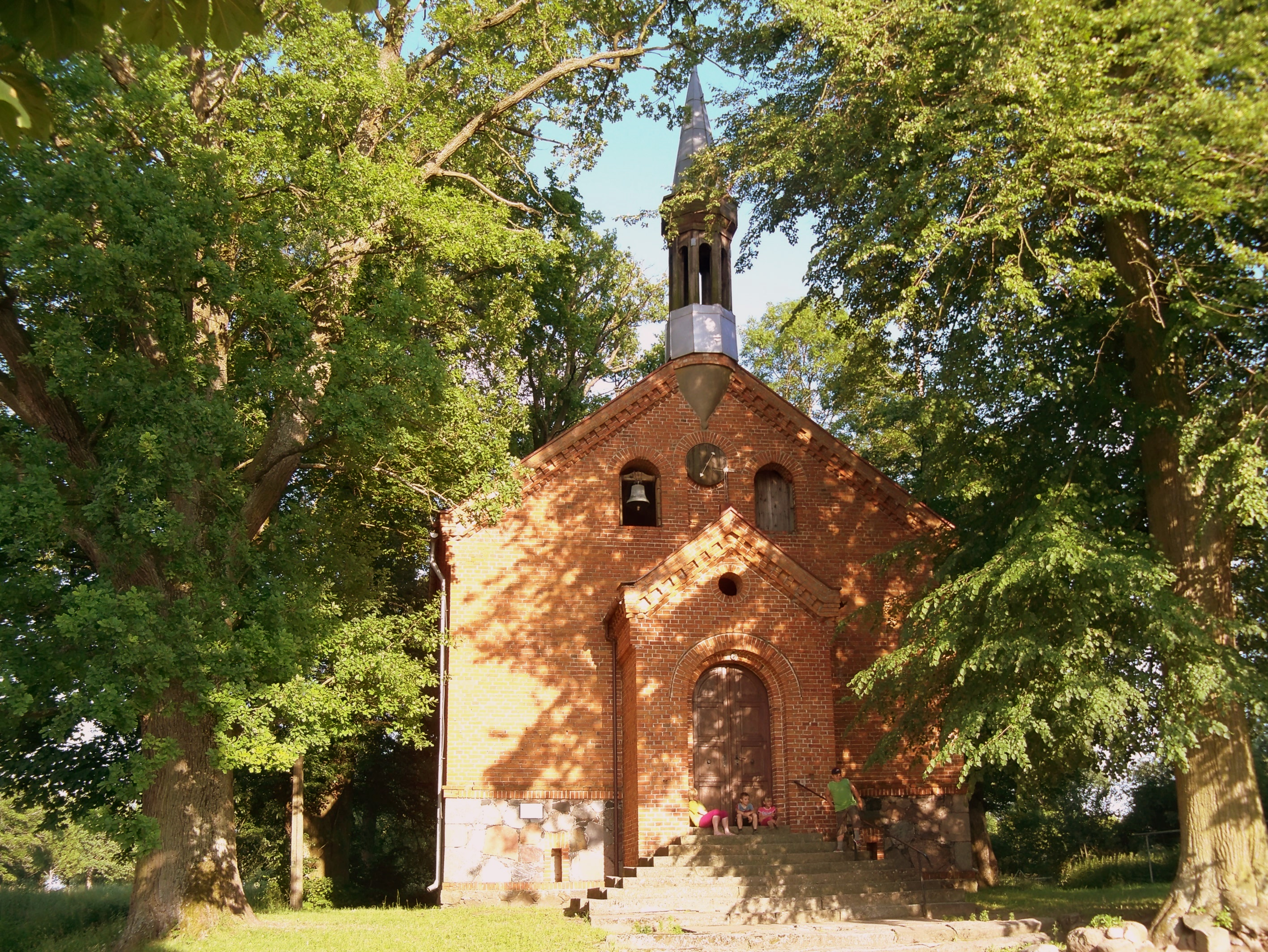 Kikowo - kościół pw. Podwyższenia Krzyża Świętego (zabytek nr 1245)